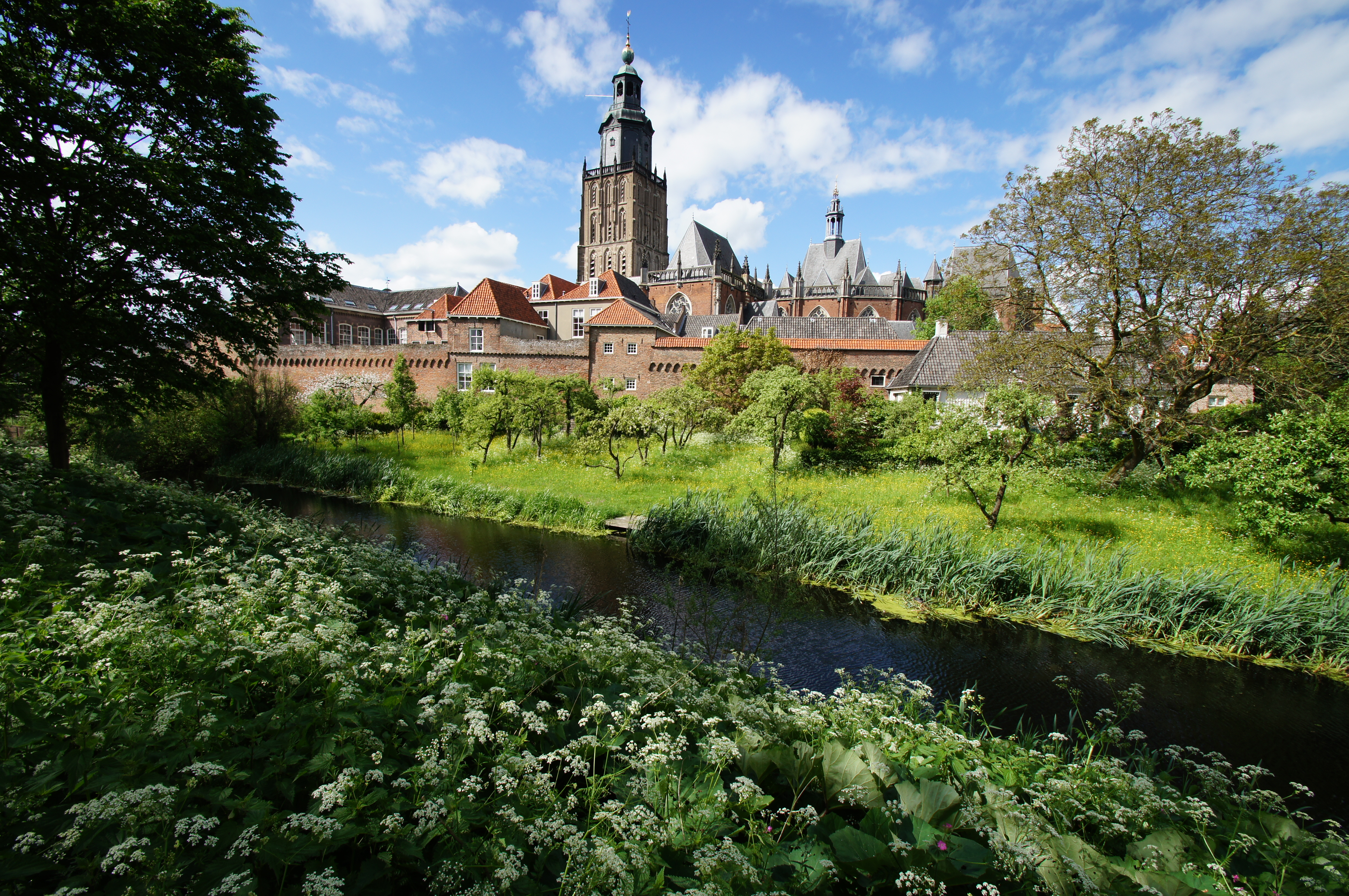 Zicht op het oudste deel van Zutphen, het Gravenhof met de Walburgkerk